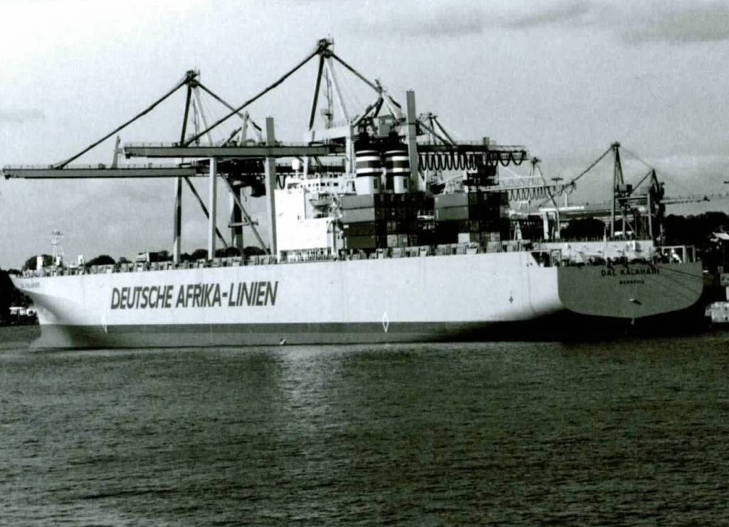 DAL Kalahari beim Laden